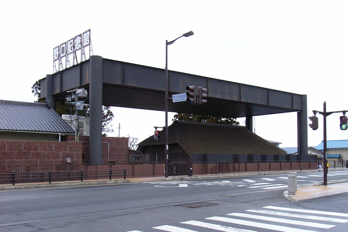 福島県猪苗代町の野口英世記念館にある生家を、北側の道路から撮影したもの。